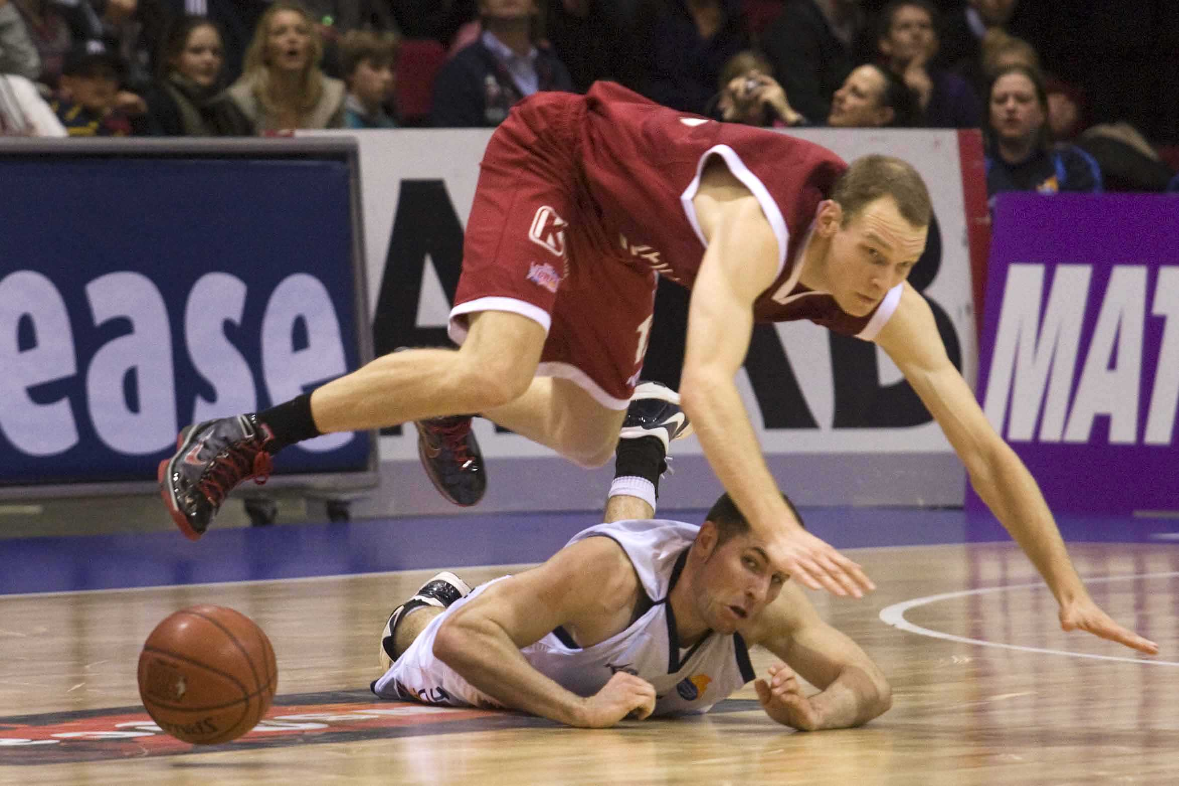 060210 GRONINGEN - basketbalwedstrijd tussen GasTerra Flames en de EiffelTowers uit Den Bosch Basketbalwedstrijd in de Dutch Basketball League tussen GasTerra Flames en EiffelTowers Den Bosch.